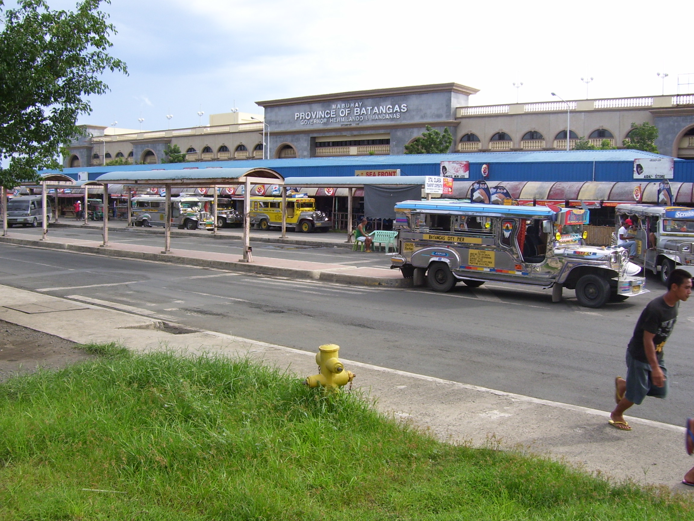 Batangas Pier, land side